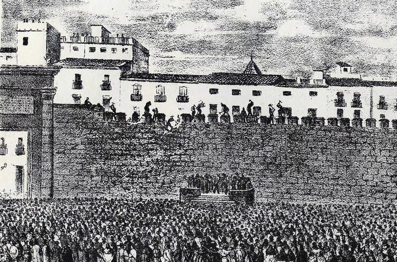 Inici de l'enderrocament de les muralles cristianes, el dia 20 de febrer de 1865, junt a la Porta del Real. València.